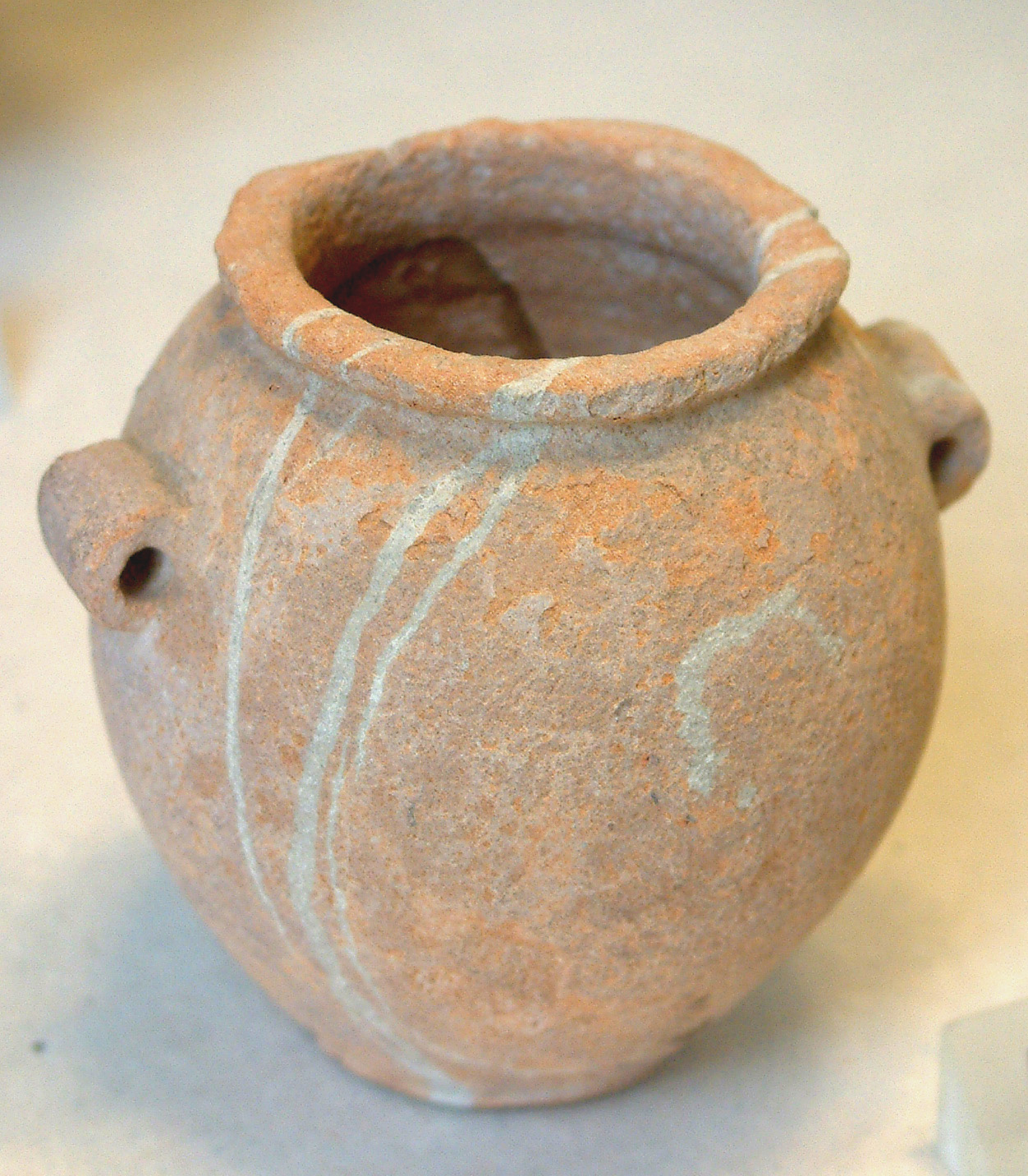 Tonnelet. Origine : Abydos. Epoque Thinite. Matériaux : Calcaire marbré